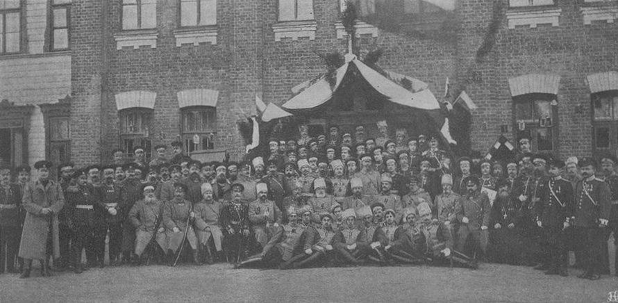 Группа офицеров и классных чинов 150-го пехотного Таманского полка в день празднования 50-летия полка.